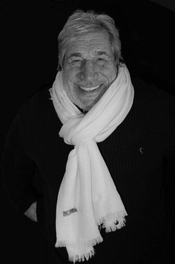 Portrait officiel de Jean-Pierre Castaldi en 2019 (Photo choisie par l'artiste)